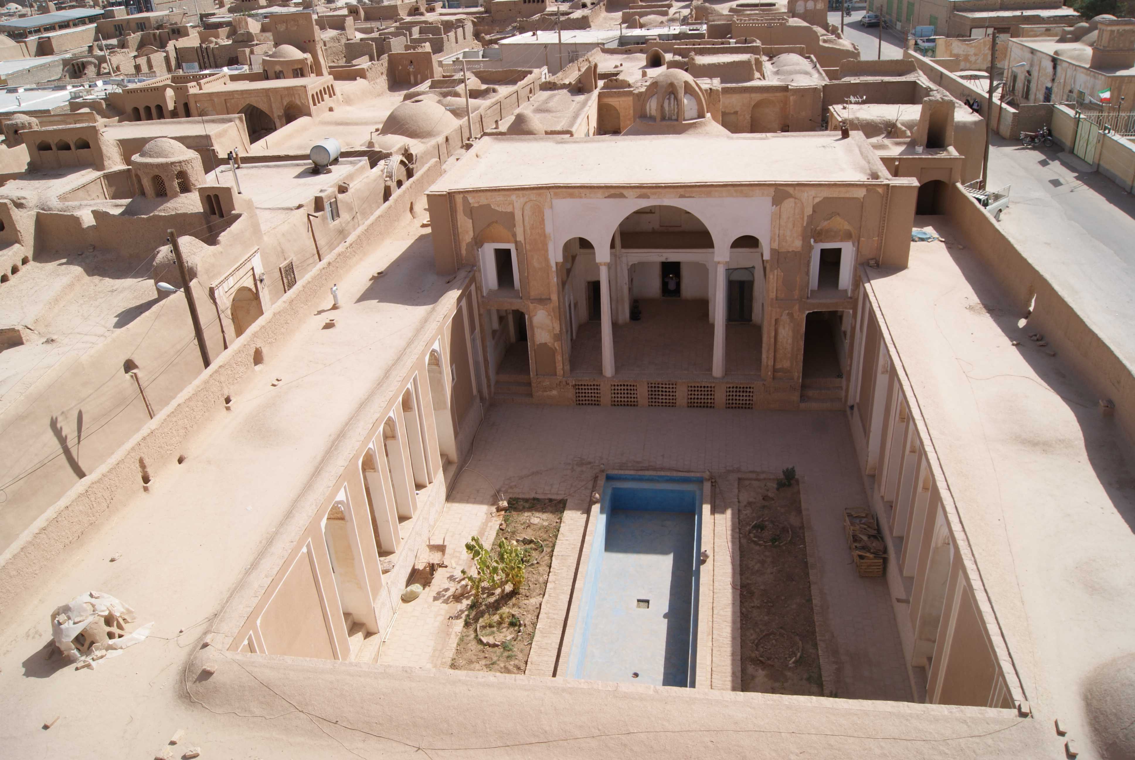 منزل وساباط مستوفی